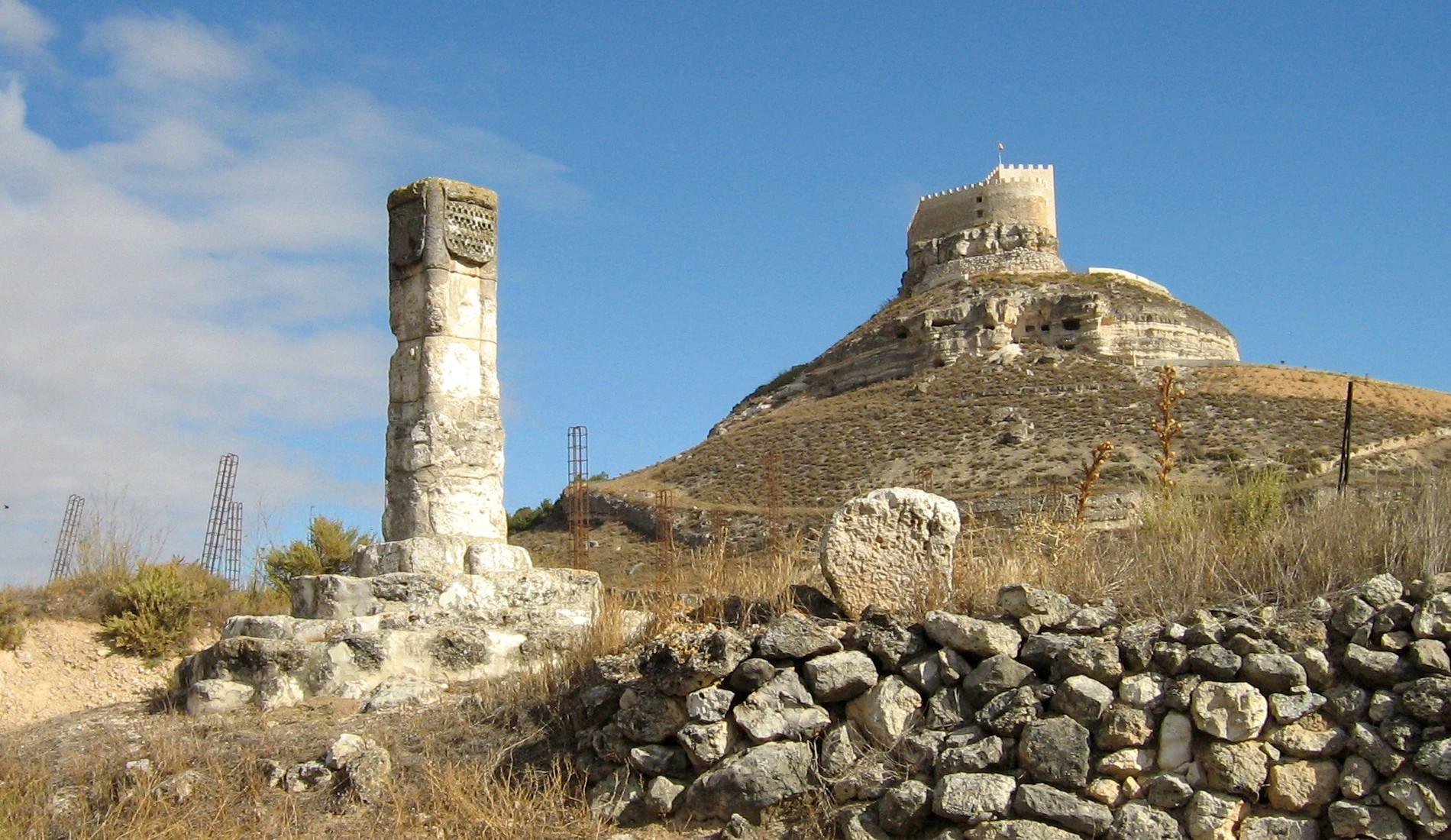 Curiel de Duero. Valle del Cuco. Valladolid. Castillo. Rollo de Justicia.